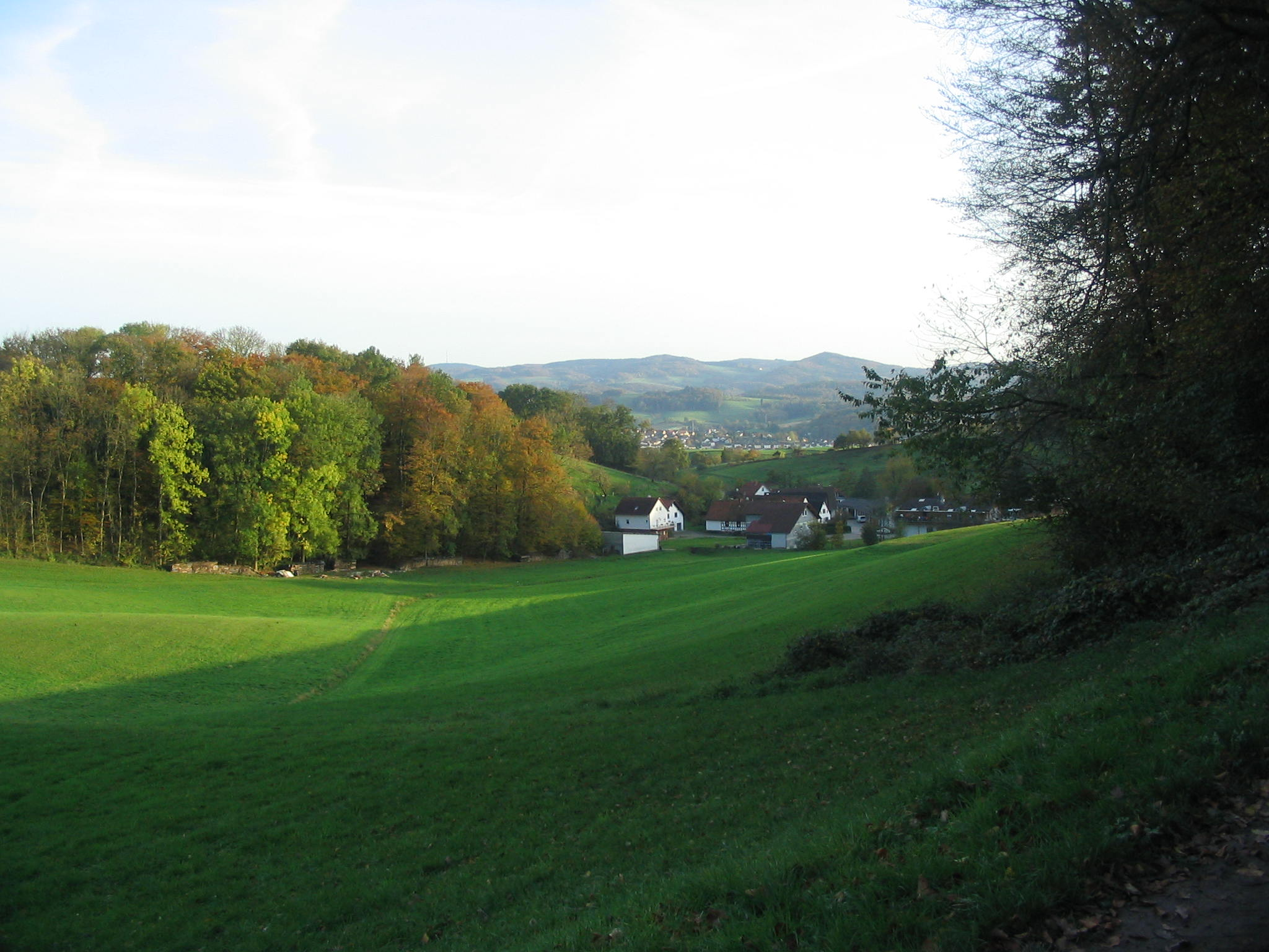 Großbreitenbachertal, Quellgebiet (Mörlenbach, Odenwald